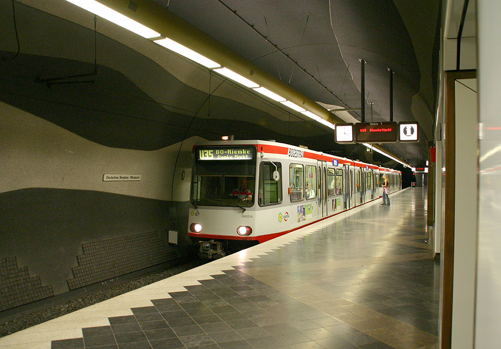 Subway Bochum, Germany, station "Deutsches Bergbaumuseum" author: Elke Wetzig (elya) date: 2005-08-20